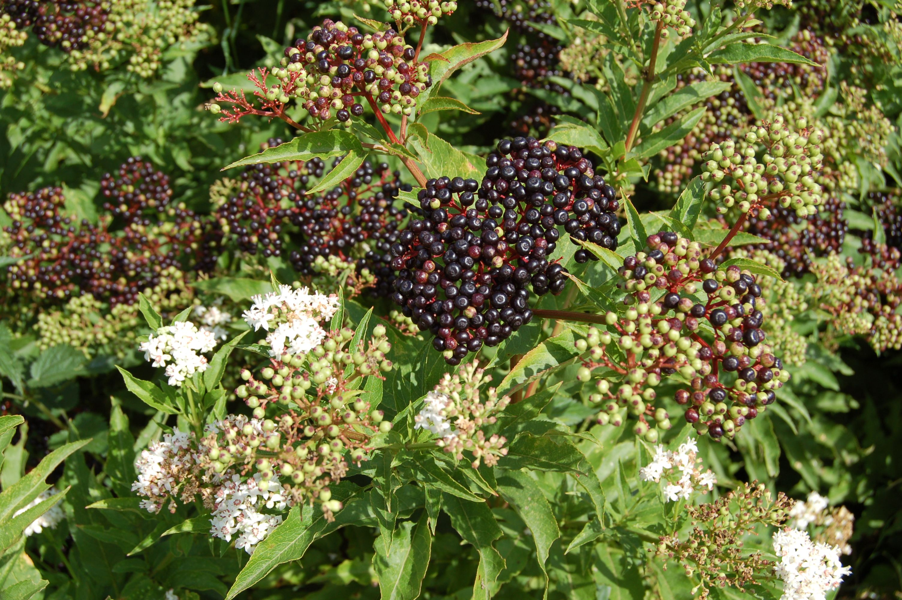 Sambucus ebulus à Marcillac (Charente, France)